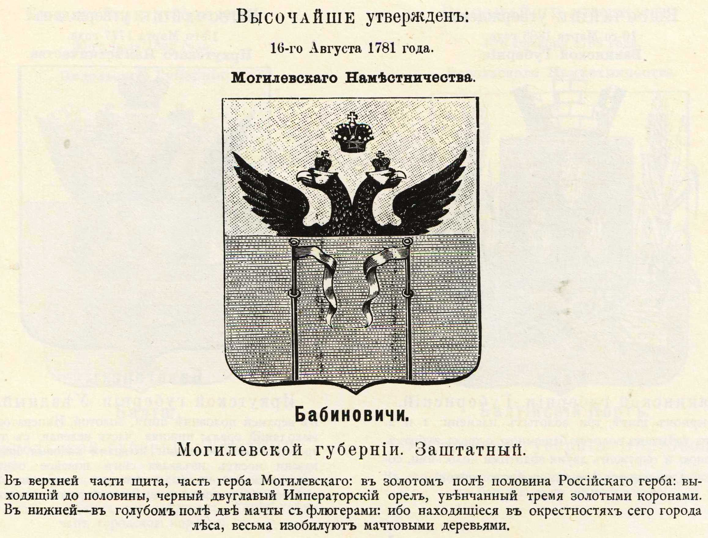 Official Russian Empire coat of arms Babinovichi. Герб Российской Империи заштатного города Бабиновичи Могилевской губернии (в 1781 - Могилёвского наместничества) с официальным описанием в Гербовнике Винклера.